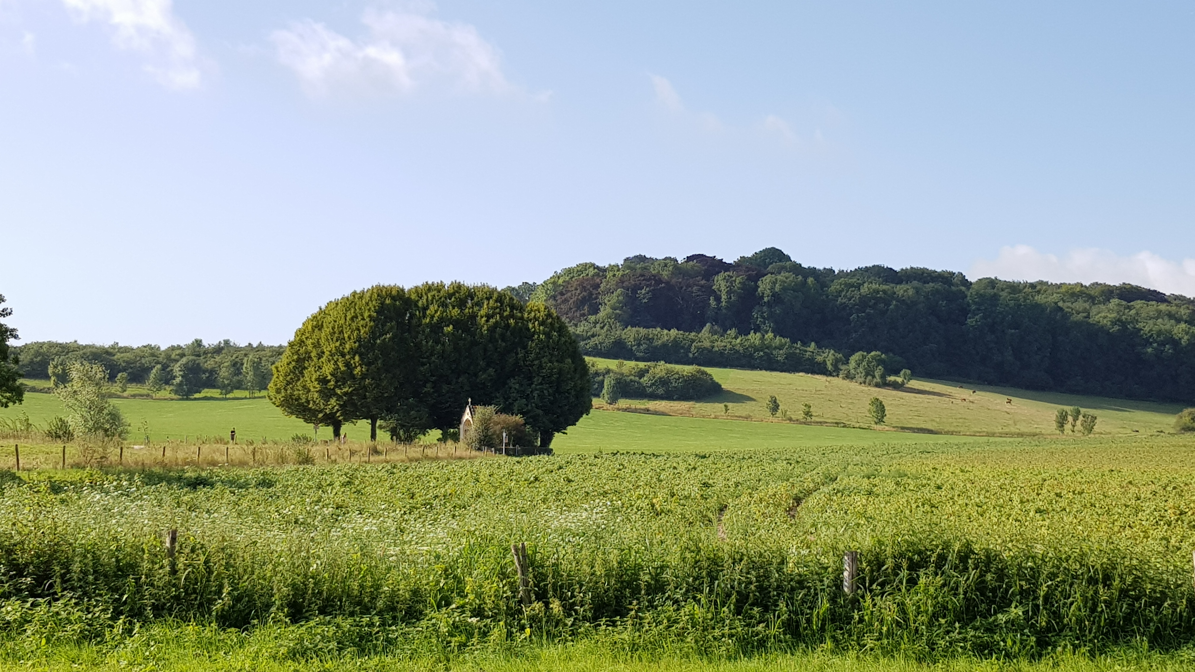 Sint-Jansboskapel, Oud-Valkenburg, Nederland